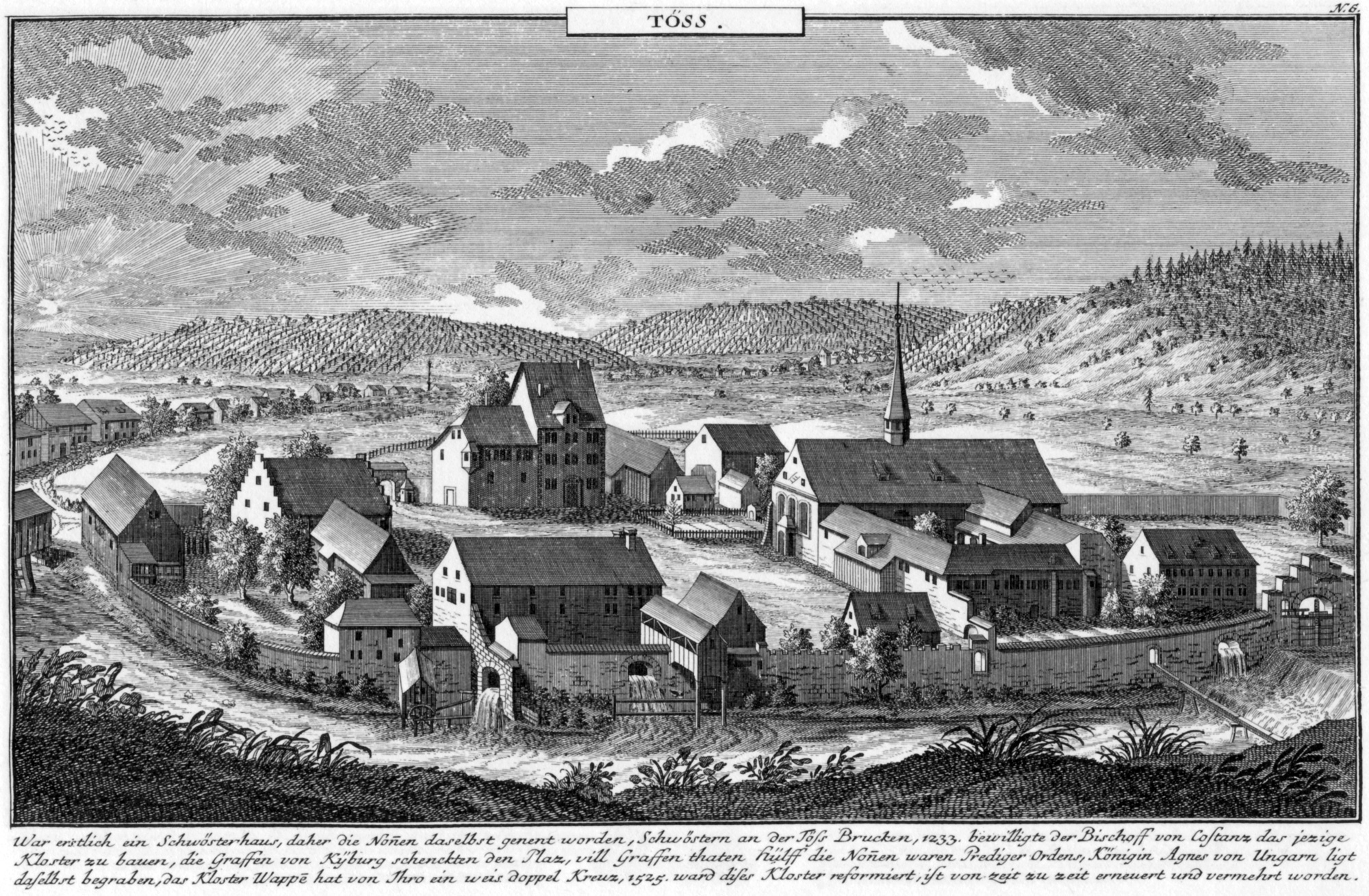 Das Amtshaus «Kloster Töss» der Stadt Zürich. Stich von David Herrliberger, ca. 1740. Erschienen in Vorstellung Loblichen Standts Zürich So genante Ausere Amtheusser, Blatt 6, 1741